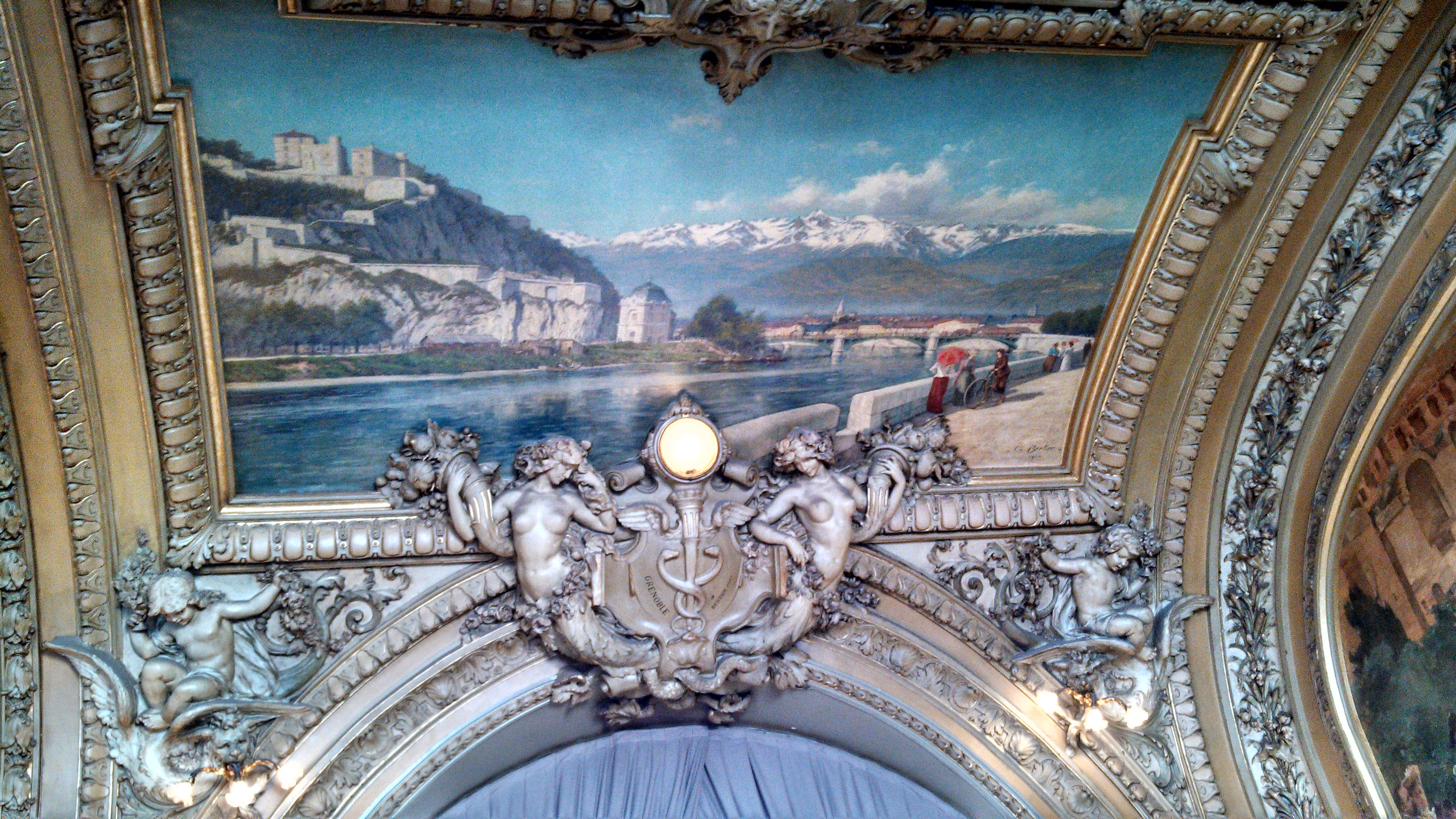 photo prise au Bar Lounge à Paris gare de Lyon, restaurant Le train bleu.